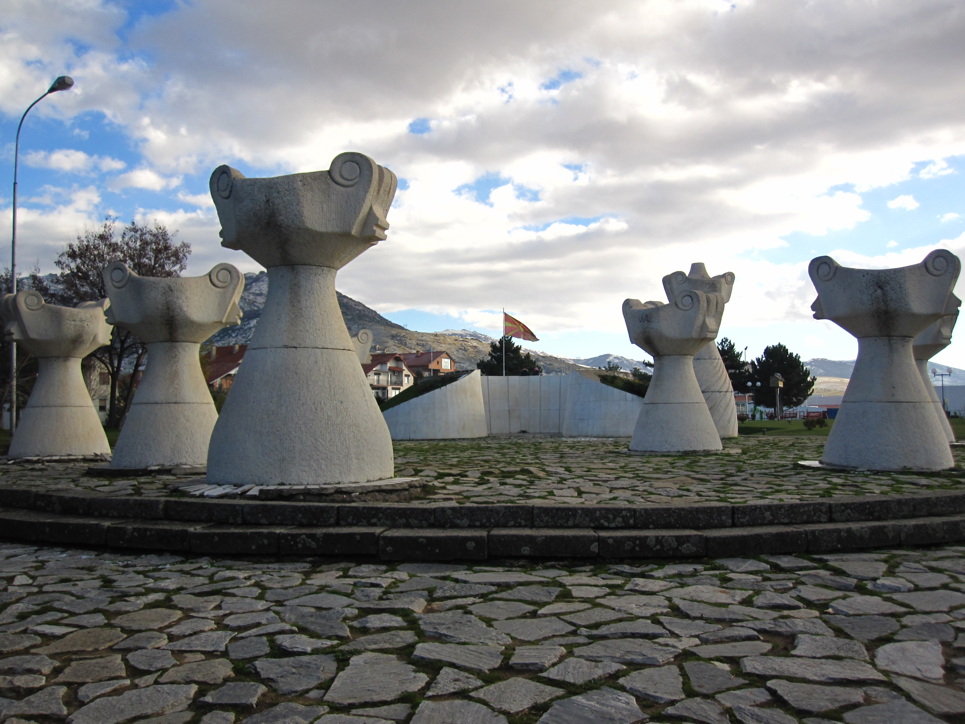 Могила на непобедените - Прилеп